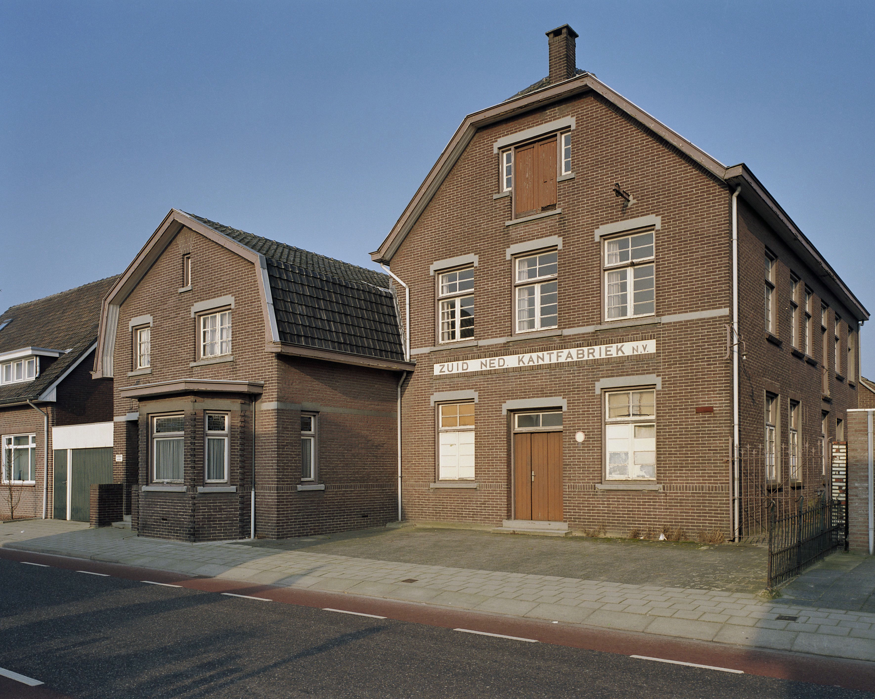 Zuid-Nederlandse Kantfabriek: Overzicht voorgevels ( voormalige sigarenfabriek ) (opmerking: Voorste twee panden zijn van een voormalige sigarenfabriek)